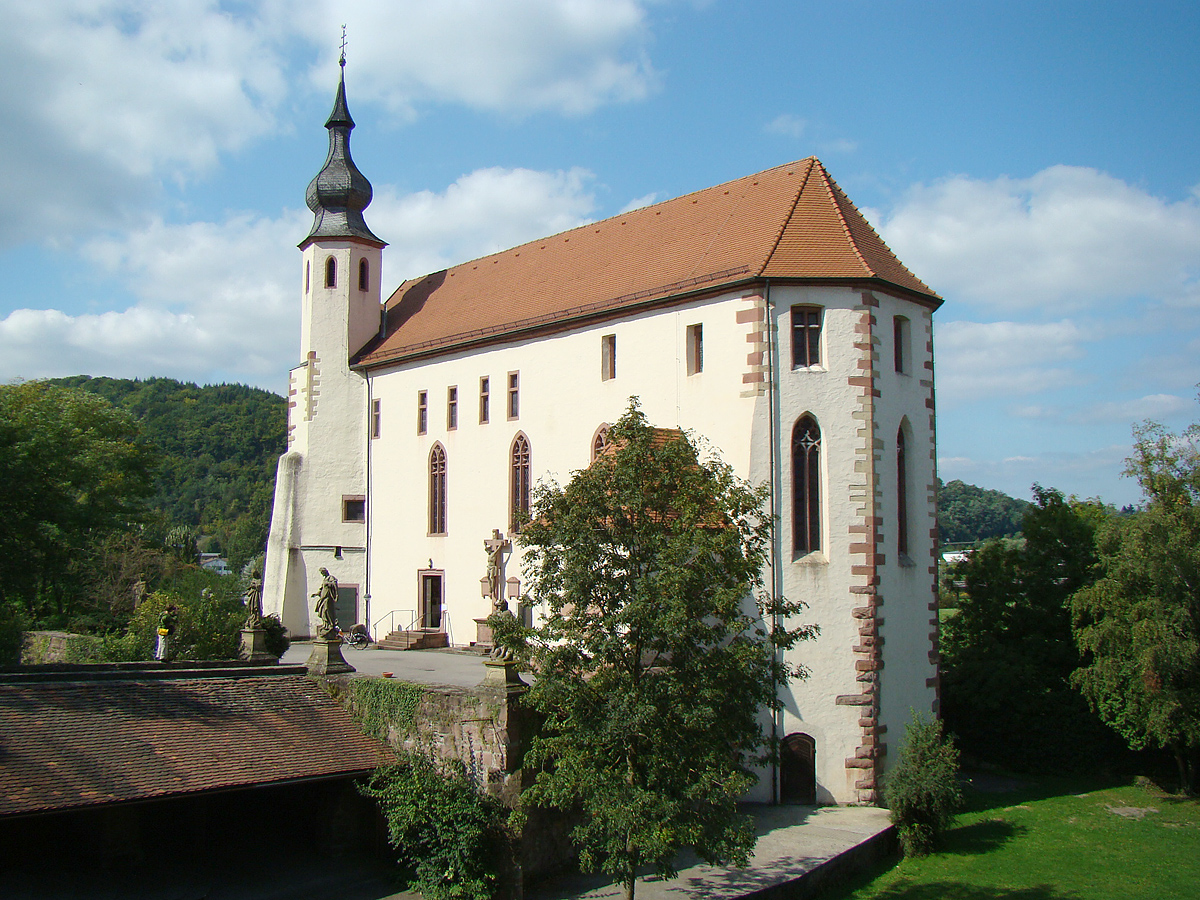 Tempelhaus in Neckarelz